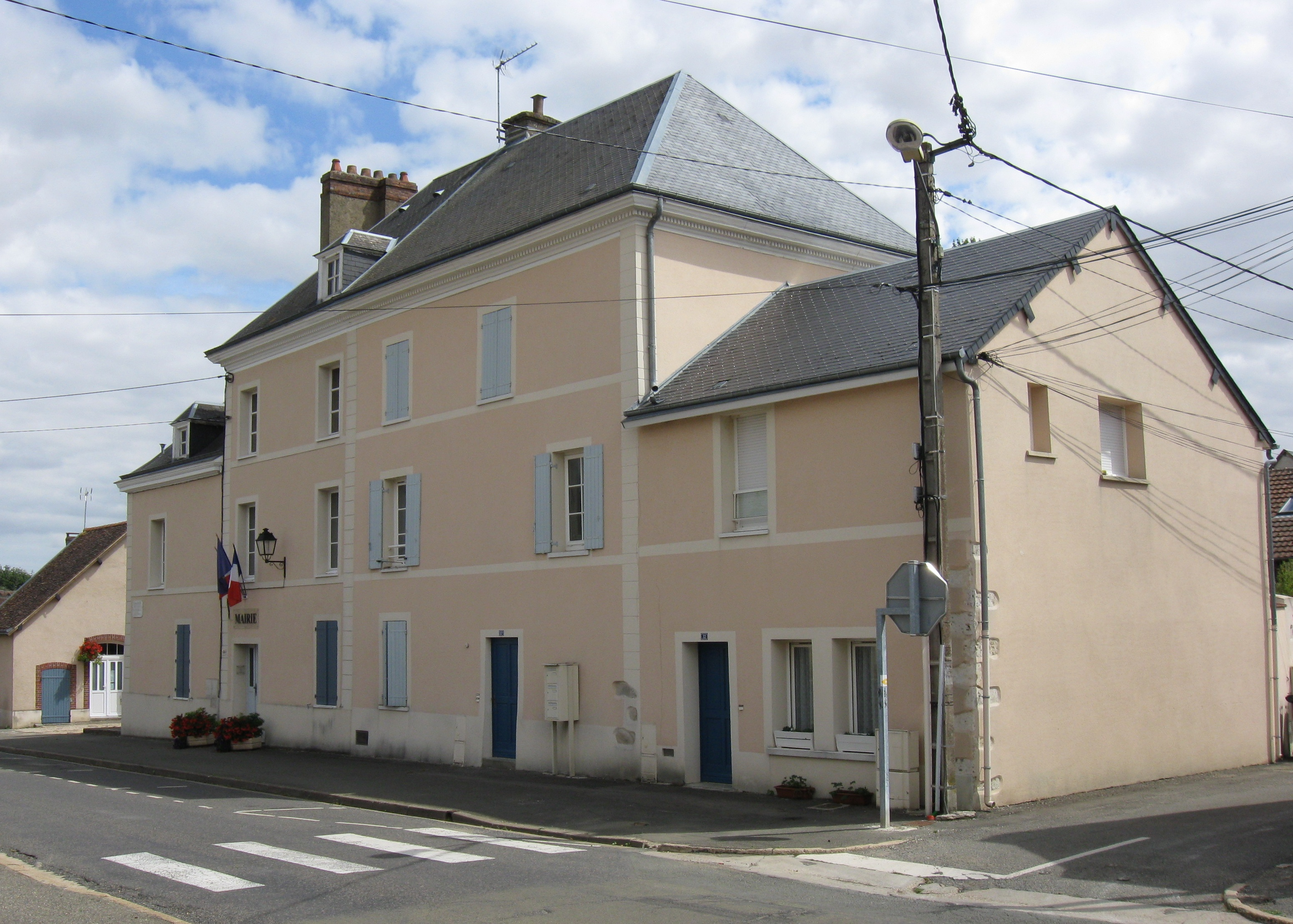 Mairie de Soulaires. (Eure-et-Loir, région Centre-Val de Loire).